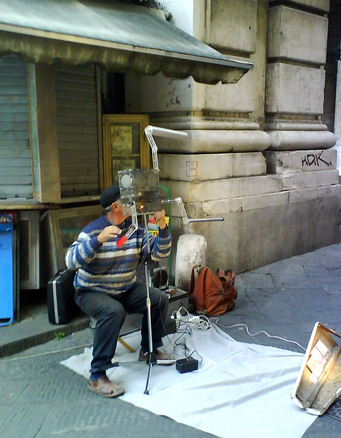 Mario VELUCCHI, 11 May 2008, teremin used in a central road of Pisa - Italy